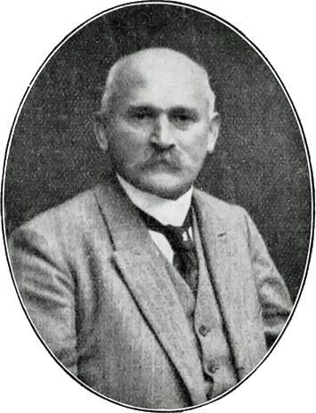 Der Lehrer und Erzgebirgsdichter Hans Siegert